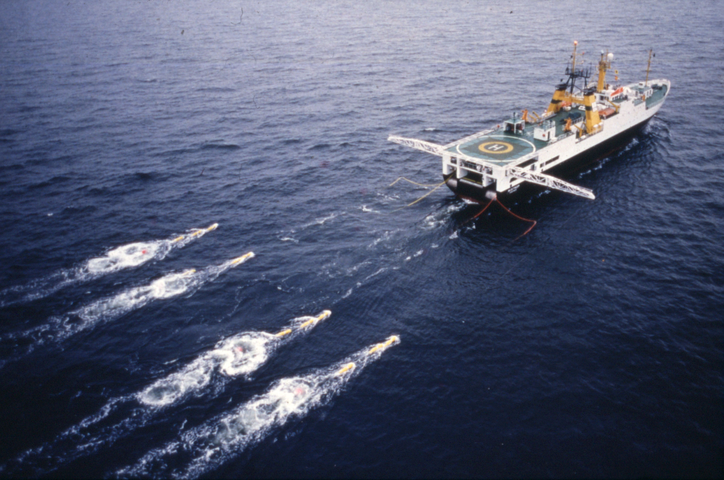 Messschiff SV Mintrop der Firma PRAKLA-SEISMOS im Hochseeeinsatz